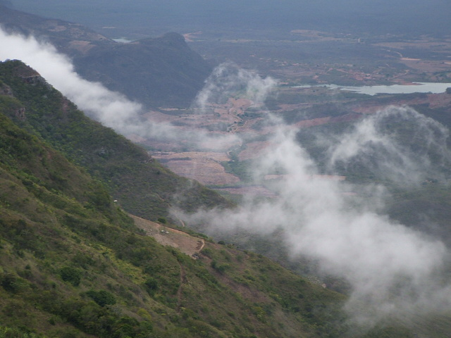 Vista alta do Pico Alto, no maciço de Baturité - CE